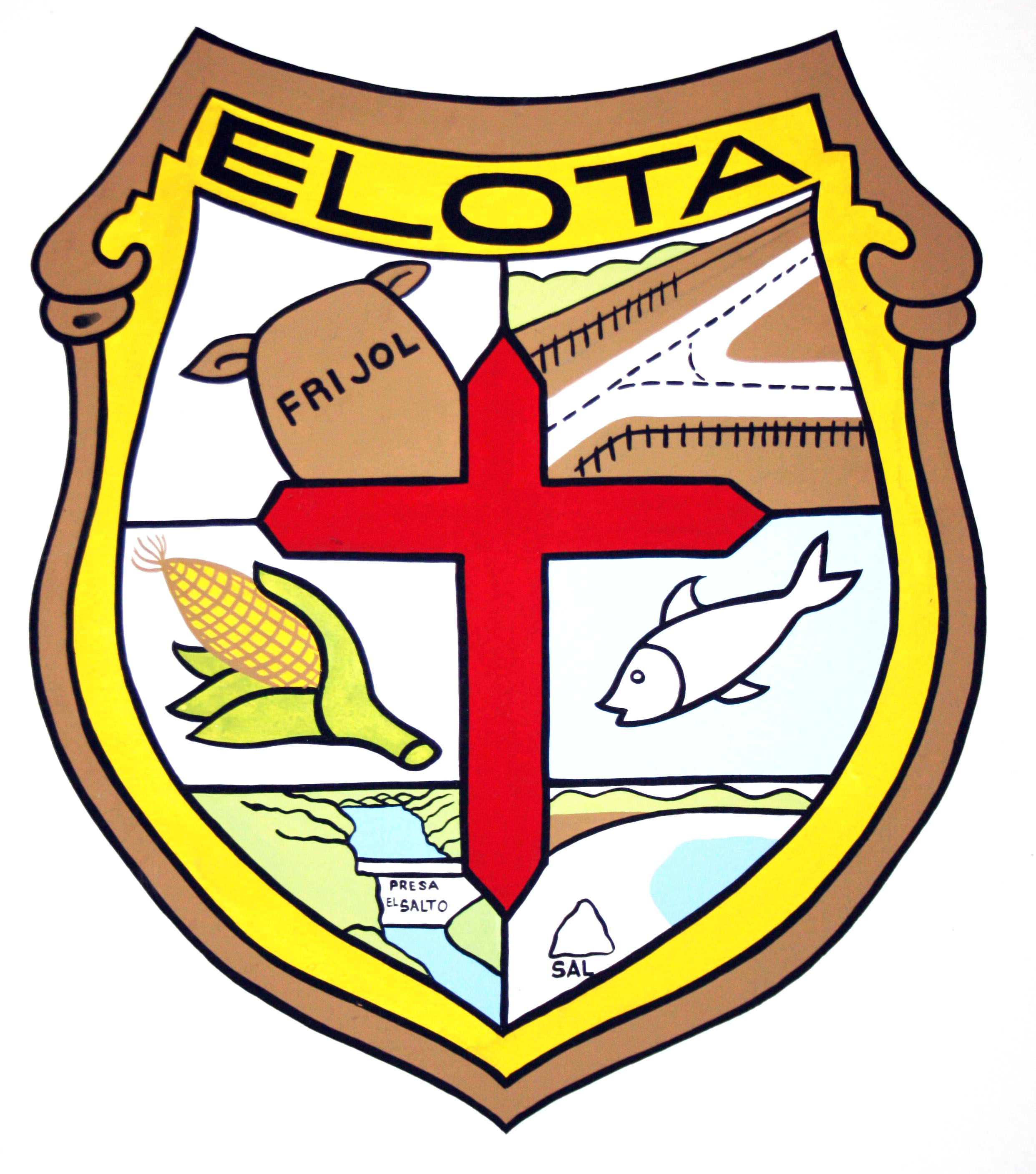 El escudo del municipio de Elota tiene en su parte central una cruz, cuyo nombre lleva la cabecera municipal, el cual se divide en seis partes, como sigue: En la parte superior izquierda un costal con la palabra frijol, de gran abundancia en la región.En la parte superior derecha se advierte un tramo de carretera internacional en su entronque con el ramal de La Cruz. En la central izquierda un elote de donde deriva su nombre significando además que el maíz es el principal cultivo en el municipio. En la parte central derecha un pescado señalando la abundancia de la especie tanto en la bahía de Ceuta como en alta mar. En la inferior izquierda se representa la presa “Ing. Aurelio Benassini”, sobre el río Elota, que irriga más de cuarenta mil hectáreas. Y en la parte inferior derecha un pequeño cerro, la vía del ferrocarril, líneas telegráficas, la bahía de Ceuta y un promotorio de sal indicando la abundancia de este producto natural en los esteros de Elota, hecho narrado por los conquistadores al mando de Nuño de Guzmán, en 1531, los que incluso llamaron “río de la sal” al actual río Elota.